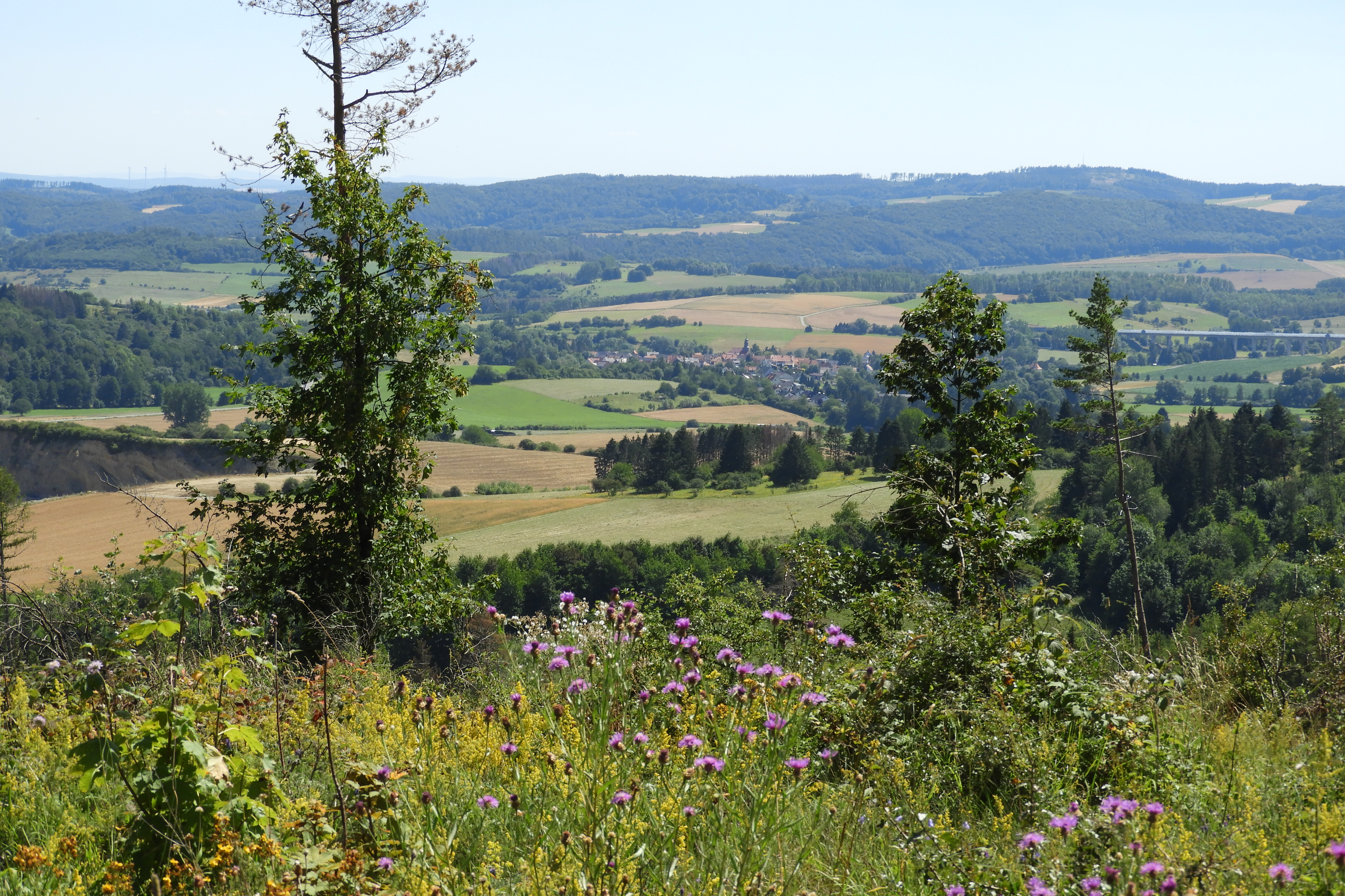 Der Rösberg erhebt sich mit einer Höhe von 539,4 m aus der Mittelgebirgslandschaft des Kaufunger Waldes, südöstlich von Rommerode, einem Ortsteil der Stadt Großalmerode im nordhessischen Werra-Meißner-Kreis. Er wird geprägt von Kalkmagerrasen, Wirtschaftsgrünland, Äckern und Wäldern, die sich kleinräumig miteinander abwechseln und ein vielgestaltiges Landschaftsbild ergeben. Wegen dem Vorkommen von besonders schutzwürdigen Tier- und Pflanzenarten auf seinen Grünlandflächen, wurde er als ein Flora-Fauna-Habitat-Gebiet zu einem Bestandteil des europaweiten Schutzgebietssystems Natura 2000, das eine länderübergreifende Vernetzung von bedrohten Lebensräumen zum Ziel hat. Auf den Halbtrockenrasen, die durch die Bewirtschaftung des Menschen entstanden sind, finden sich mehr als sechzig verschiedene Pflanzenarten, von denen viele als selten und gefährdet angesehen werden.